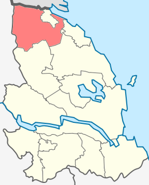 Севастьяновское сельское поселение